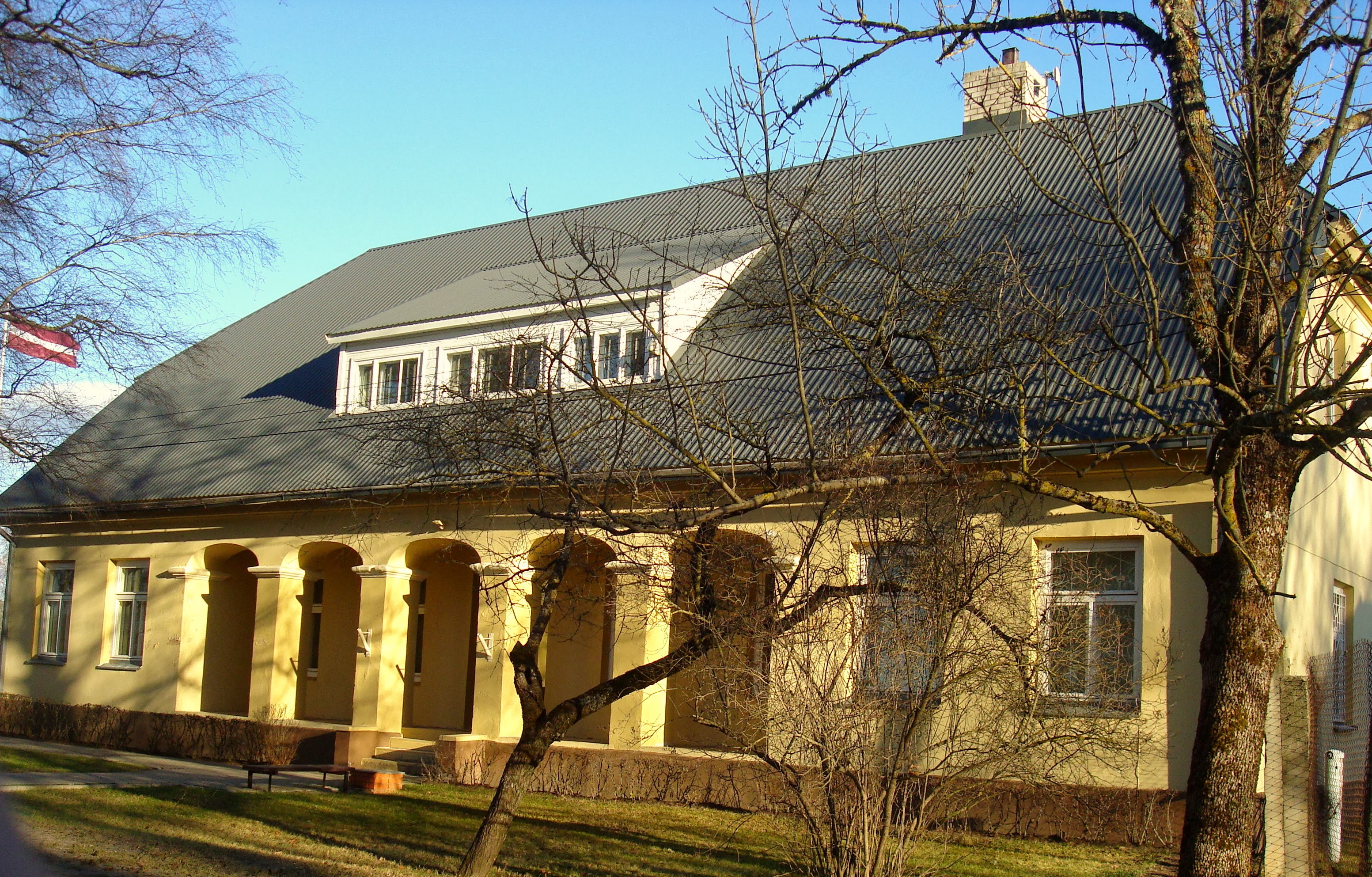 Ķoņu bibliotēka